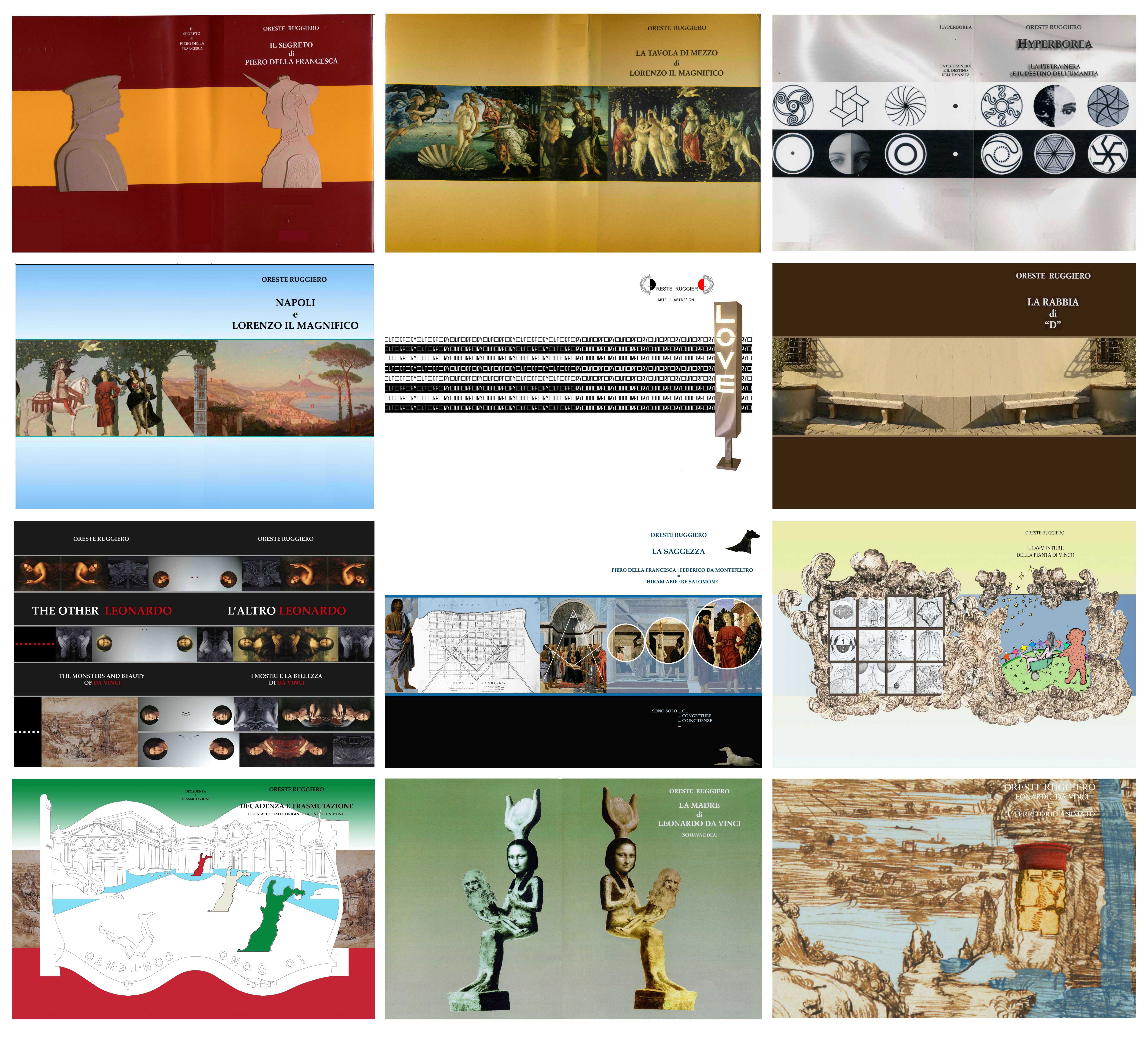 Copertine pubblicazioni create da Oreste Ruggiero